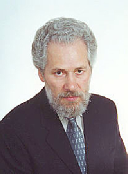 Георгий Николаевич Чагин